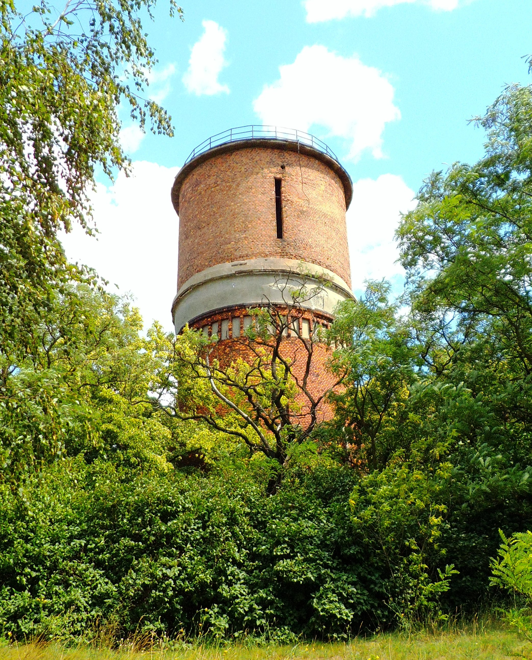 Wieża ciśnień na Podgórzu w Toruniu